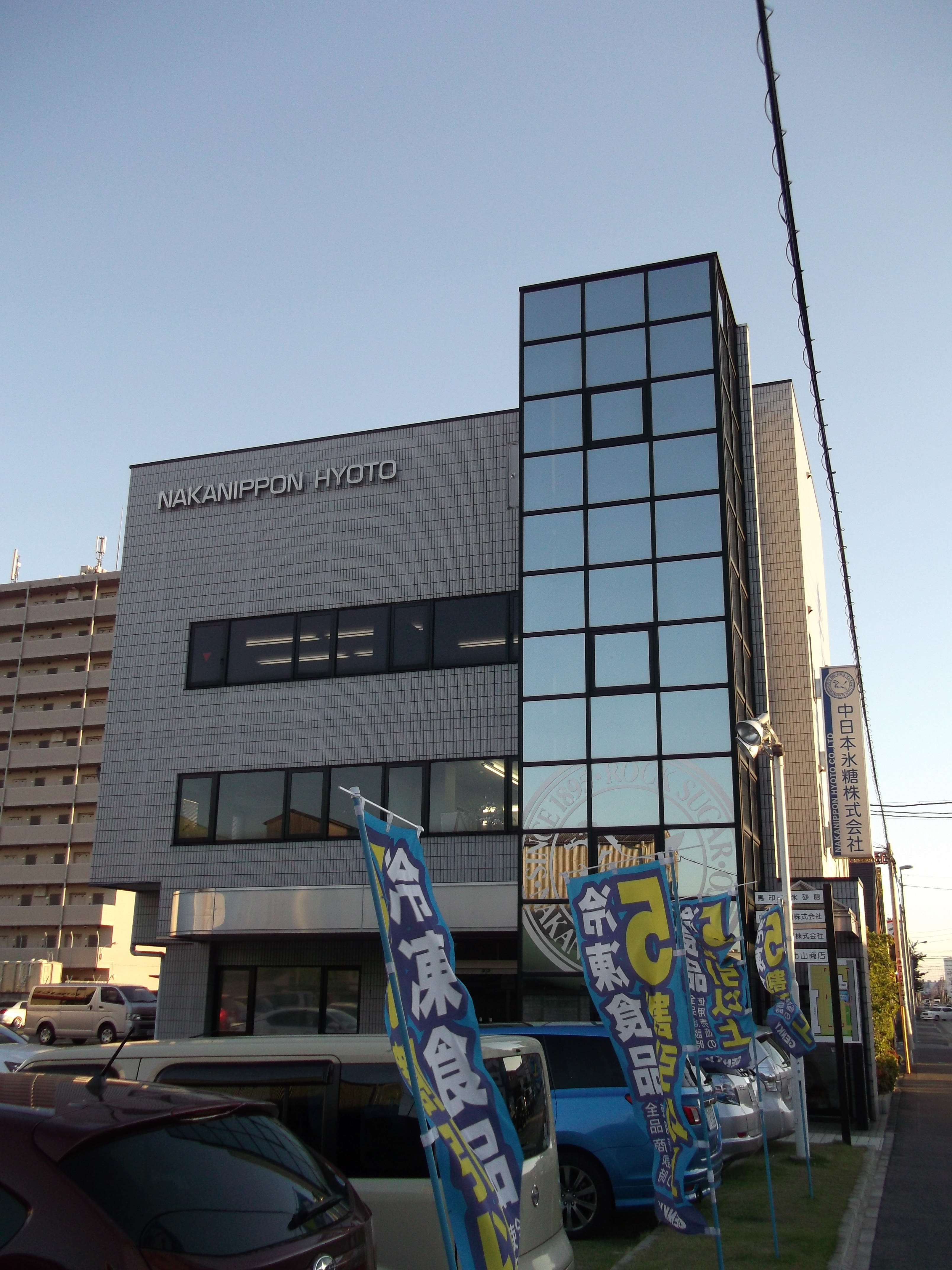 名古屋市中川区玉川町の中日本氷糖本社を西側公道北側より撮影